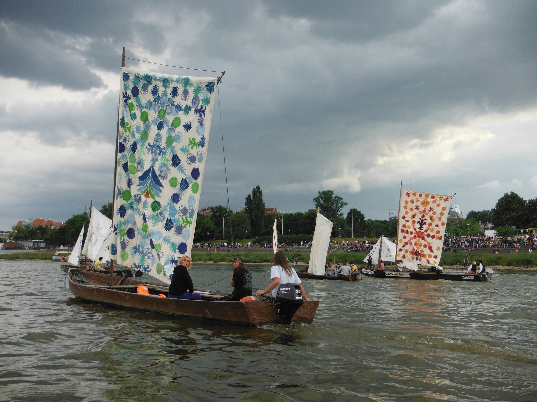 "Wianki" w Warszawie (2015).